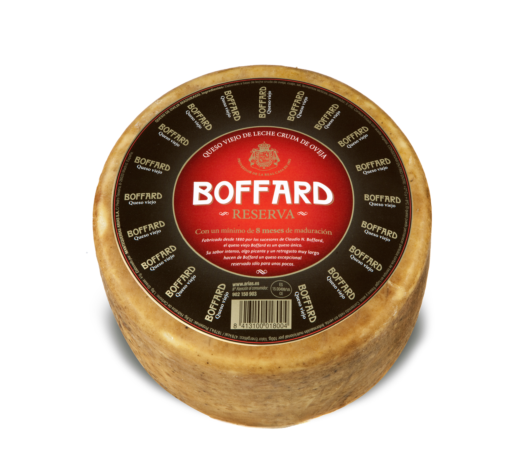 Aspecto actual de un queso Boffard